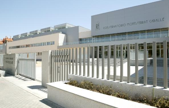 Conservatorio Monserrat Caballe en Arganda del Rey